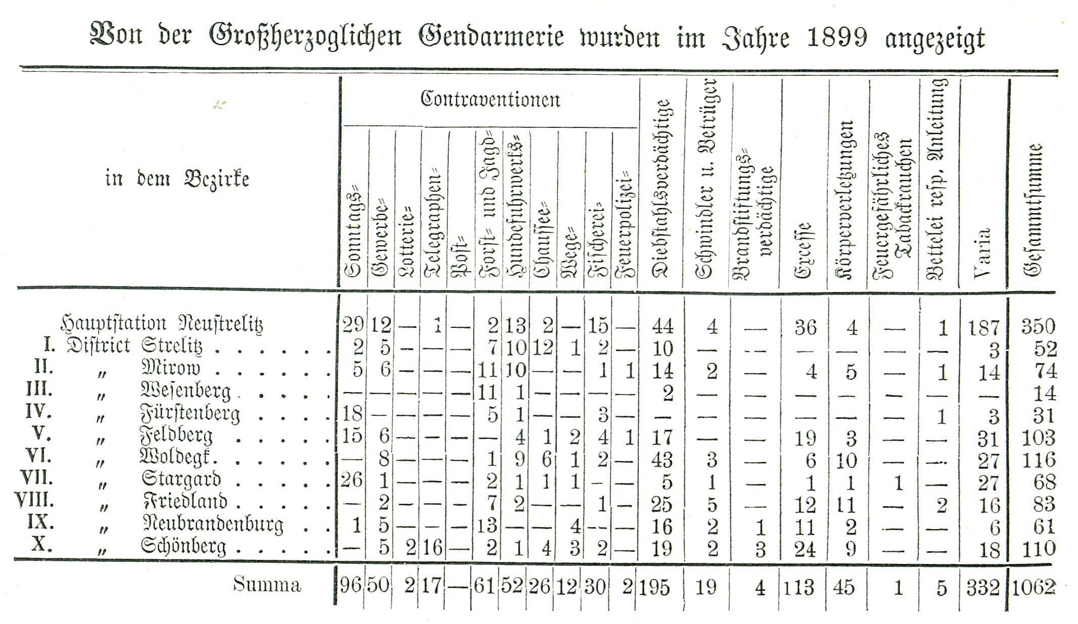 durch die Gendarmerie/Districtshusaren aufgenommene Anzeigen im Großherzogtum Mecklenburg-Strelitz